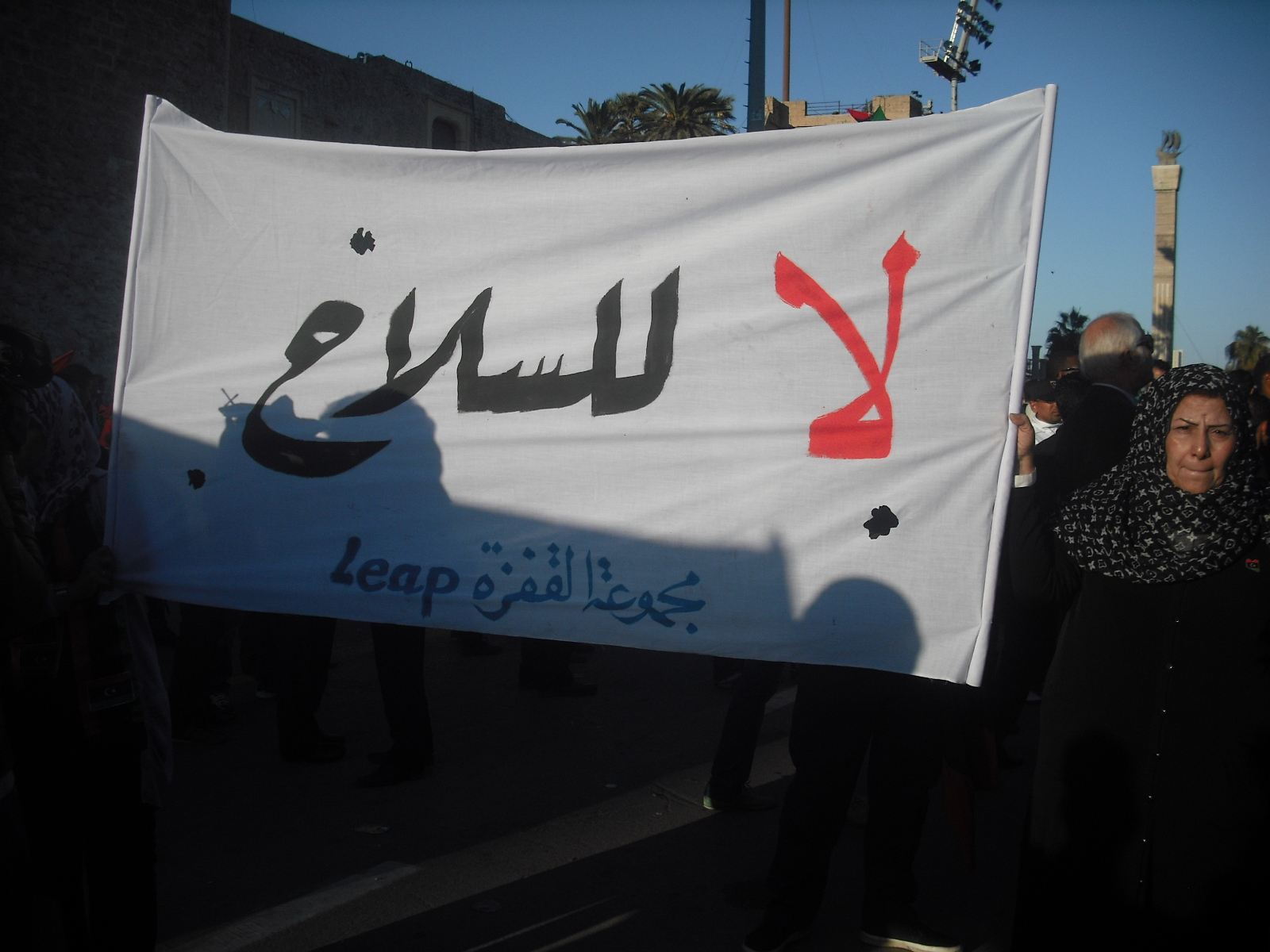 NTC member Intissar al-Akili says establishing security is the top priority for Libya's new administration. انتصار العقيلي عضو المجلس الوطني الانتقالي تقول إن استتباب الأمن هو في صدارة أولويات الحكومة الليبية الجديدة. Intissar al-Akili, membre du CNT, a expliqué que la mise en place de la sécurité est la priorité de la nouvelle administration libyenne.